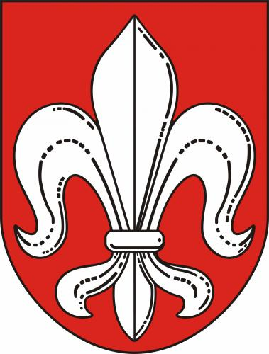 Seč (okres Chrudim), znak obce